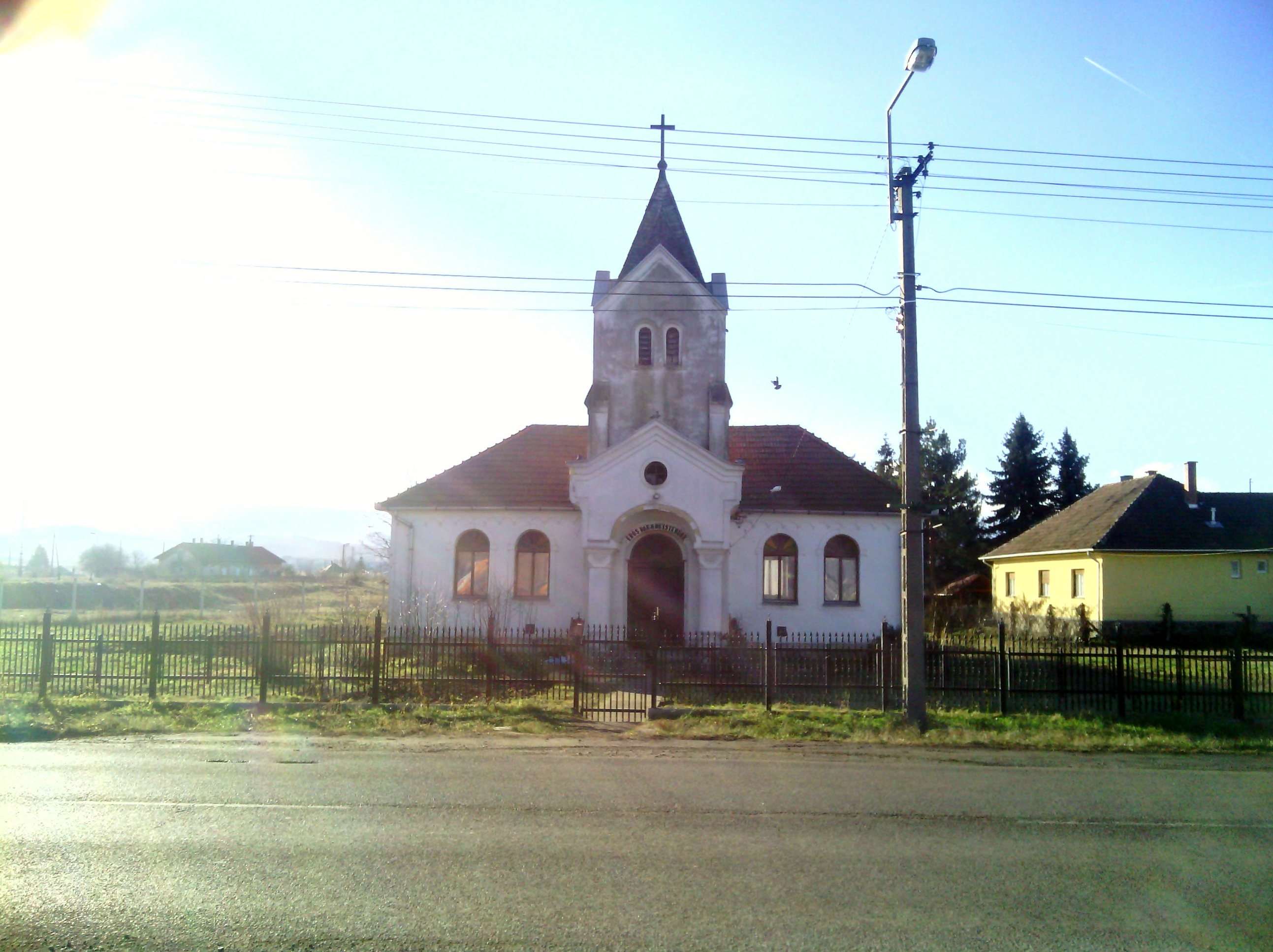 Evangélikus templom, Kisterenye